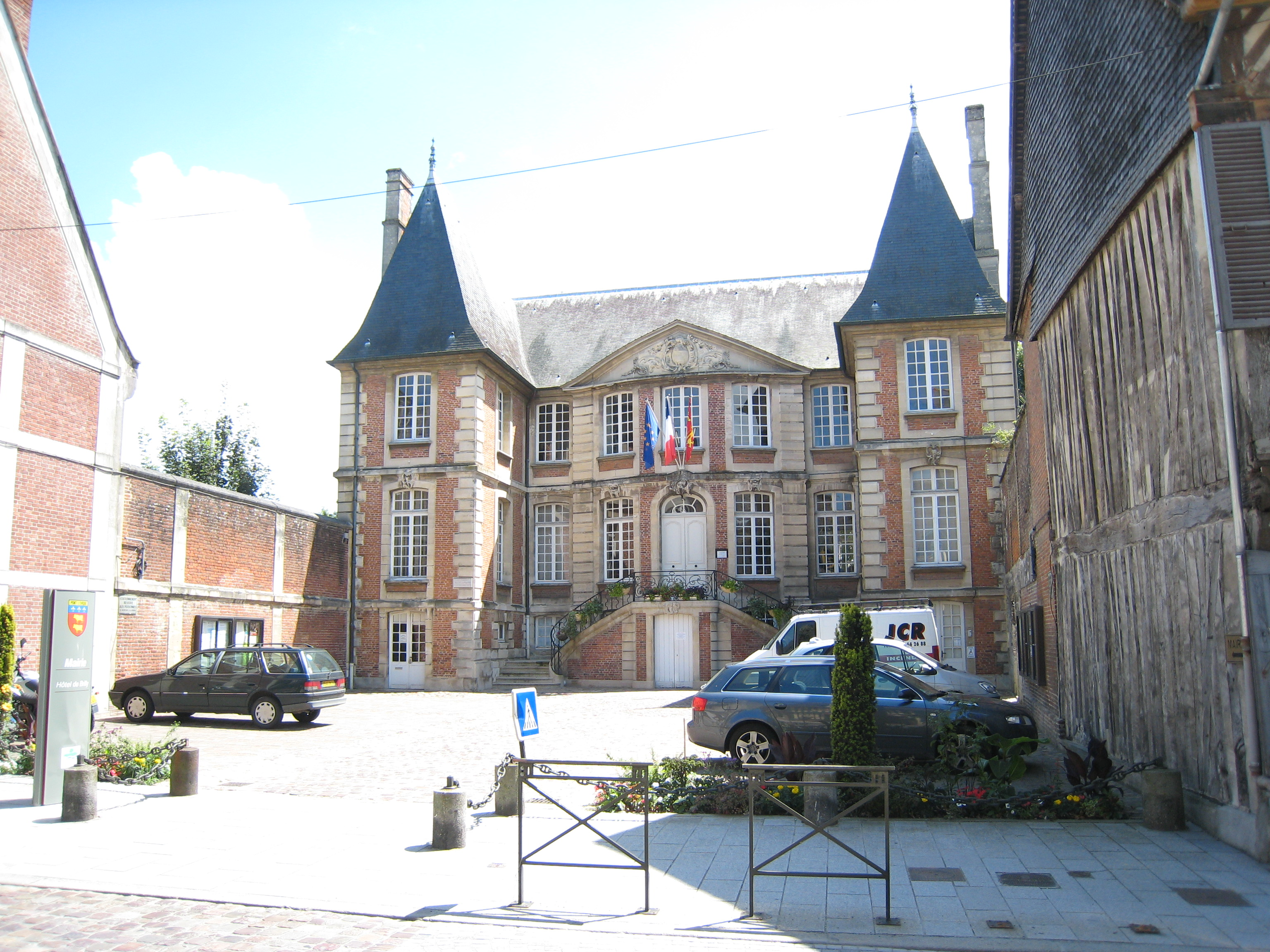 Hôtel de Ville de Pont-l'Évêque (ancien hôtel de Brilly), Calvados